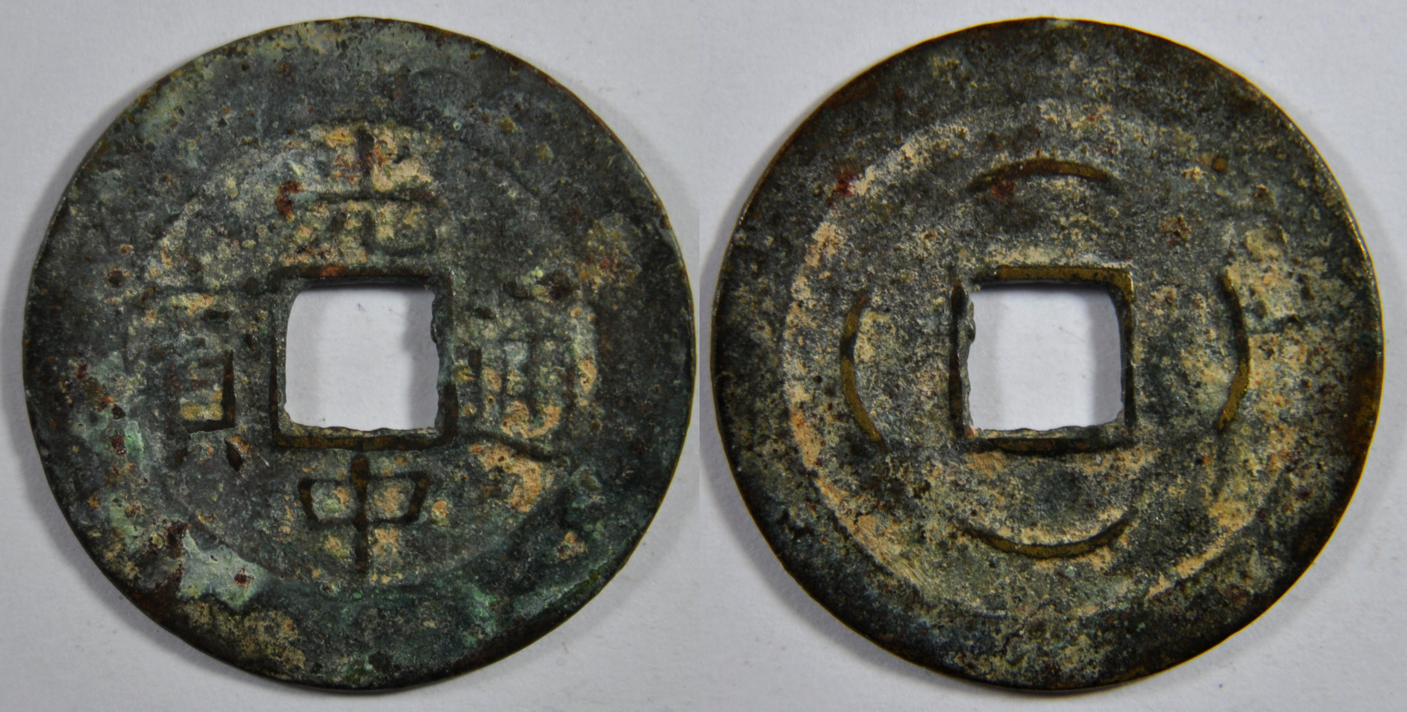 Une monnaie d'une sapèque en cuivre de Nguyen Van Hue ère Quang Trung (1788-1792), de la dynastie des Tay Son. (1778-1802) A/ Quang Trung thong bao (Monnaie courante de l'ère Quang Trung) R/ 4 croissants vers l'intérieur Dimension : 24,71 mm Poids : 2 g. Remarque : La révolte des Tay Son (C'est le nom de leur village) commence en 1771. Il s'agit de 3 frères du clan de Ho (Hue, Lu et Nhac) qui prennent le nom de Nguyen. Ils sont aidés par les seigneurs Trinh qui gouvernent le Nord du Dai Viet. Ils finissent par vaincre les seigneurs Nguyen : ils prennent d'abord la ville de Qui Nhon (1773), près de leur village, puis la ville de Gia Dinh (Saigon) en 1776. Ils massacrent la famille Nguyen sauf un neveu, Nguyen Anh, qui se réfugie dans le delta du Mékong où il obtient l'appui des Siamois puis des Français. C'est lui qui fondera la dynastie Nguyen en 1802. En 1778, Nuguyen Van Nhac se proclame empereur. En 1786, Nguyen Hue attaque la partie nord du pays controlée par les seigneurs Trinh. Rapidement, il les vainc. Il est accueilli par l'empereur Le Hien Tong. Il épouse sa fille, Le Ngoc Han. Mais l'empereur meurt rapidement et est remplacé par son petit-fils, Le Man De. Celui-ci essaie de se passer des Tay Son mais échoue. Il se réfugie en Chine et l'armée chinoise de Qian Long des Qing intervient. Nguyen Van Hue se proclame empereur après avoir pris la capitale en 1788 et chasse les Chinois. Il y a donc deux empereurs dans le pays plus un réfugié en Chine ! Référence : 1057 BNF (Catalogue des monnaies vietnamiennes, F. Thierry, 1987) Indice de rareté : Très Commune